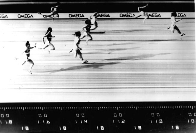 Factual corrections and alternative descriptions are encouraged separately from the original description. Additionally errors can be reported at this page to inform the Bundesarchiv. Original historic description: 100m-Weltrekordlauf Marlies Oelsner, Zielfoto ADN-ZB Tele 2.7.77 Dresden: DDR-Leichtathletik-Meisterschaften Den 100-m-Weltrekordlauf von Marlies Oelsner (SC Motor Jena) in 10,88 Sekunden vom 1.7.1977 sah die Zielkamera so: Oelsner, M. Hamann, I. Brestrich, R. Schneider, B. Eckert, M. Dalchow, S. Briebsch, S. Kuchling (v.r.n.l.) . [Vlnr: S. Kuchling, S. Briebsch, M. Dalchow, Bärbel Eckert (verheiratete Bärbel Wöckel), R. Schneider, I. Brestrich, Monika Hamann, Marlies Oelsner (verheiratete Marlies Göhr)] Abgebildete Personen: * Göhr, Marlies: Leichtathletin, DDR * Hamann, Monika: Läuferin, DDR * Wöckel, Bärbel: Leichtathletin, Läuferin, SC Motor Jena, Olympiateilnehmerin 1976 und 1980, Vaterländischer Verdienstorden (VVO) in Gold 1950, DDR